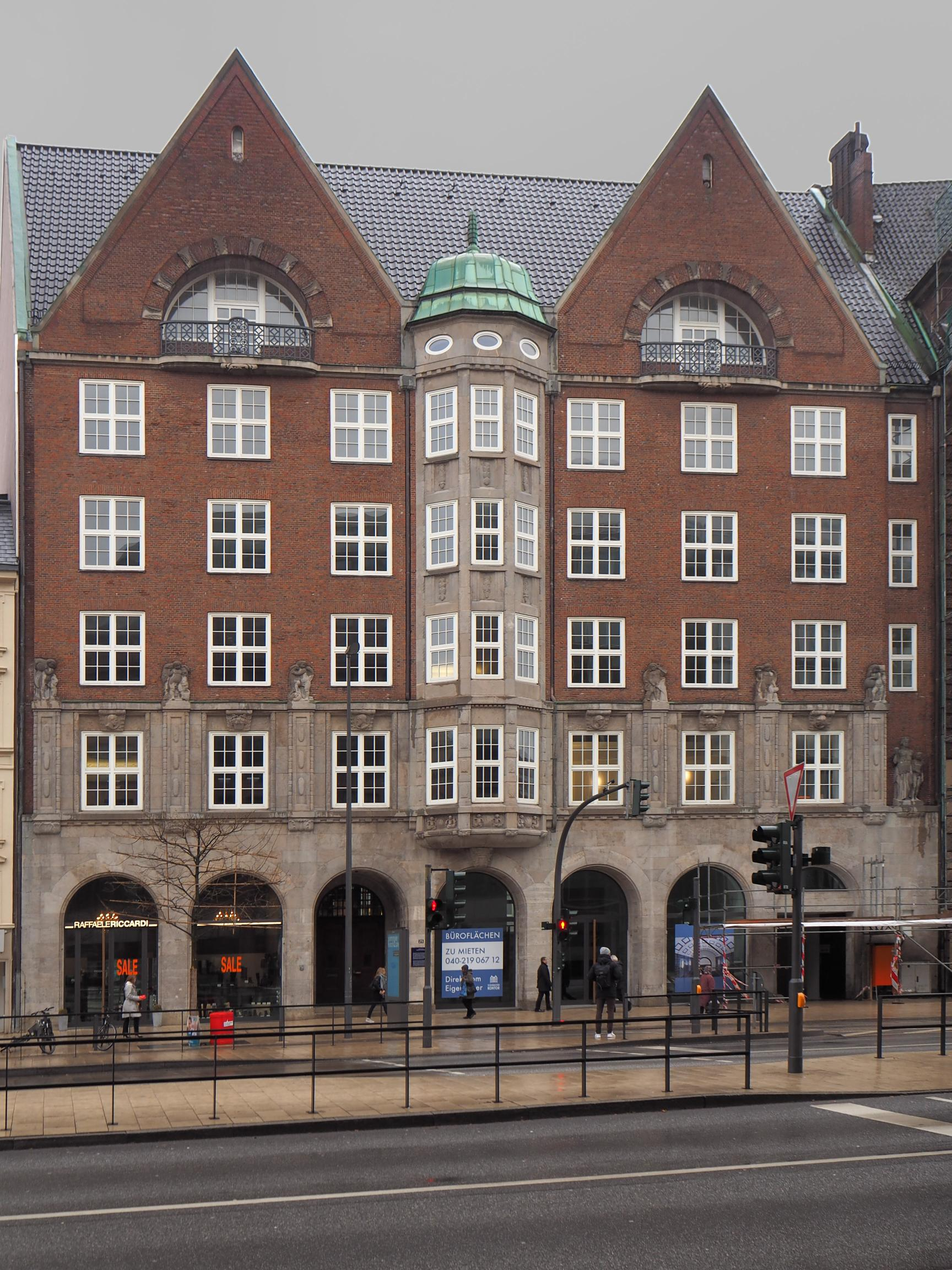 Hamburg, Dammtorstraße, ehemalige Oberschulbehörde, Foto: Februar 2015